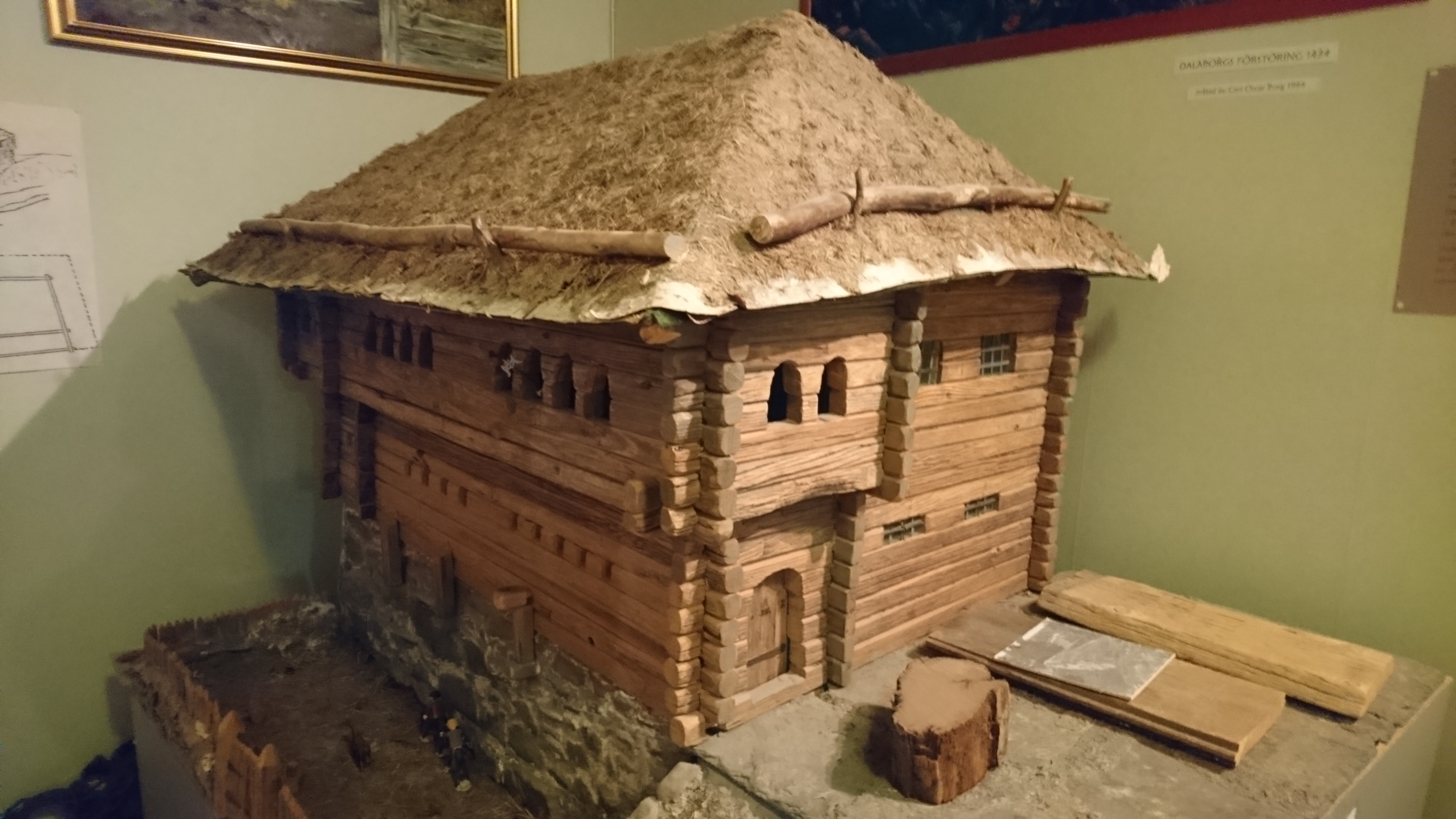 Fri konstruktion av Dalaborg, från Melleruds museum.